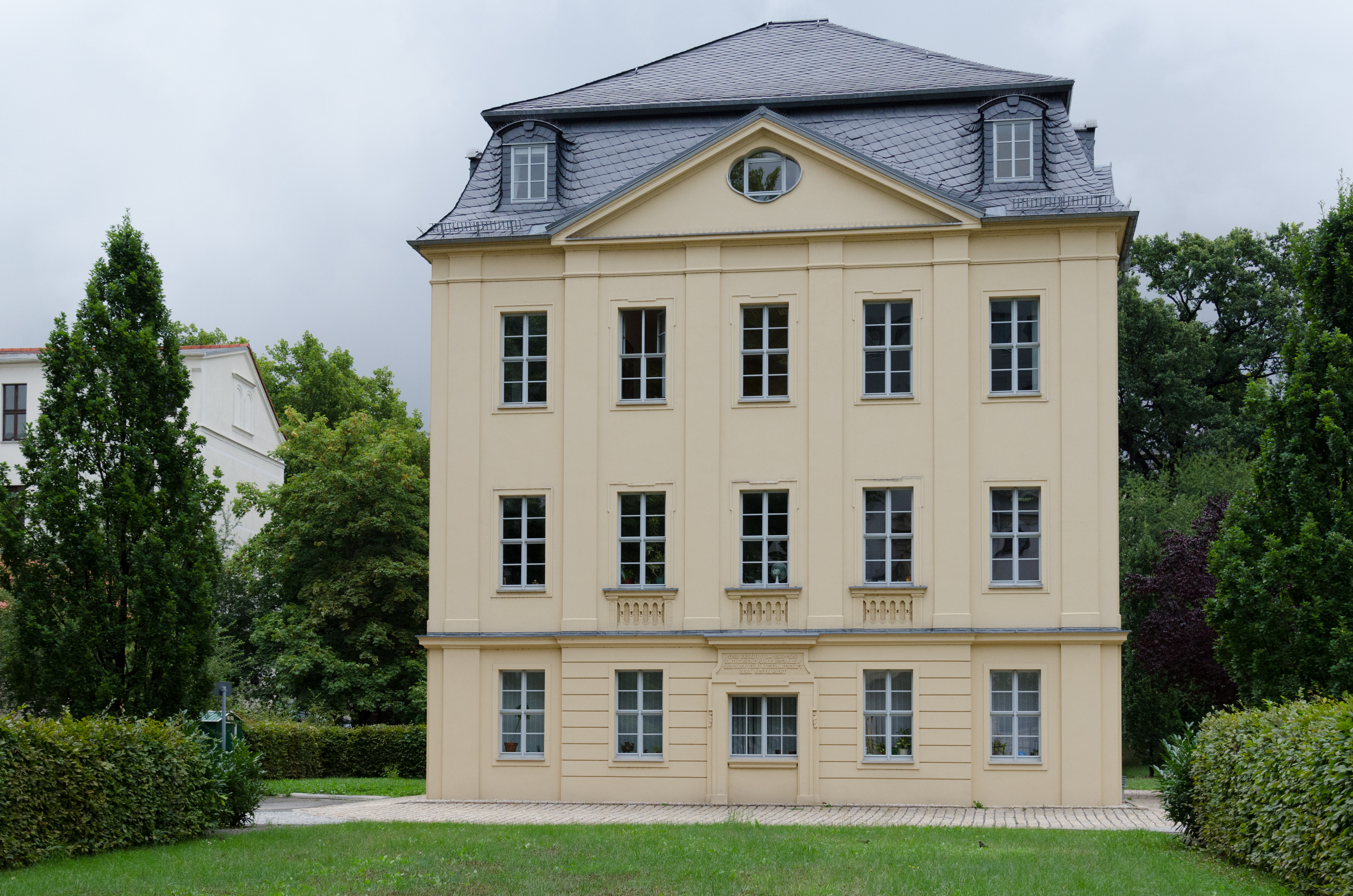 Gera, Amthorstraße 4,, Humboldtstraße 23